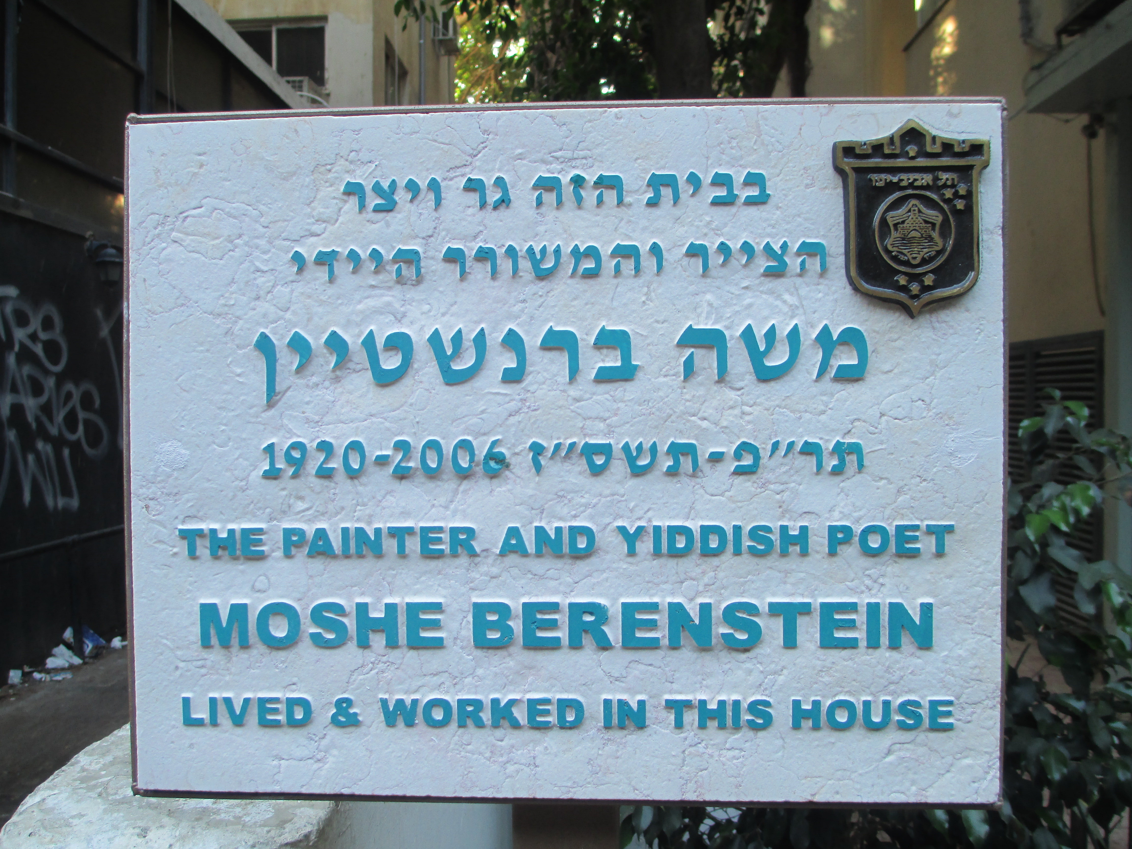 לוחית זיכרון לצייר והמשורר משה ברנשטיין בכניסה לביתו ברחוב דיזנגוף 184 בתל אביב